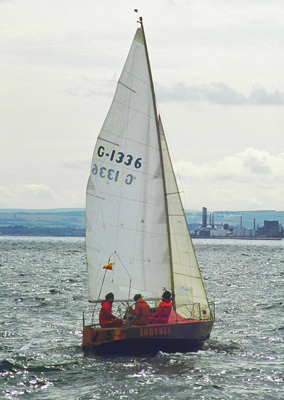 Weltmeisterschaft 1980. IORchen Design und Bau: Dr Joachim Harpprecht